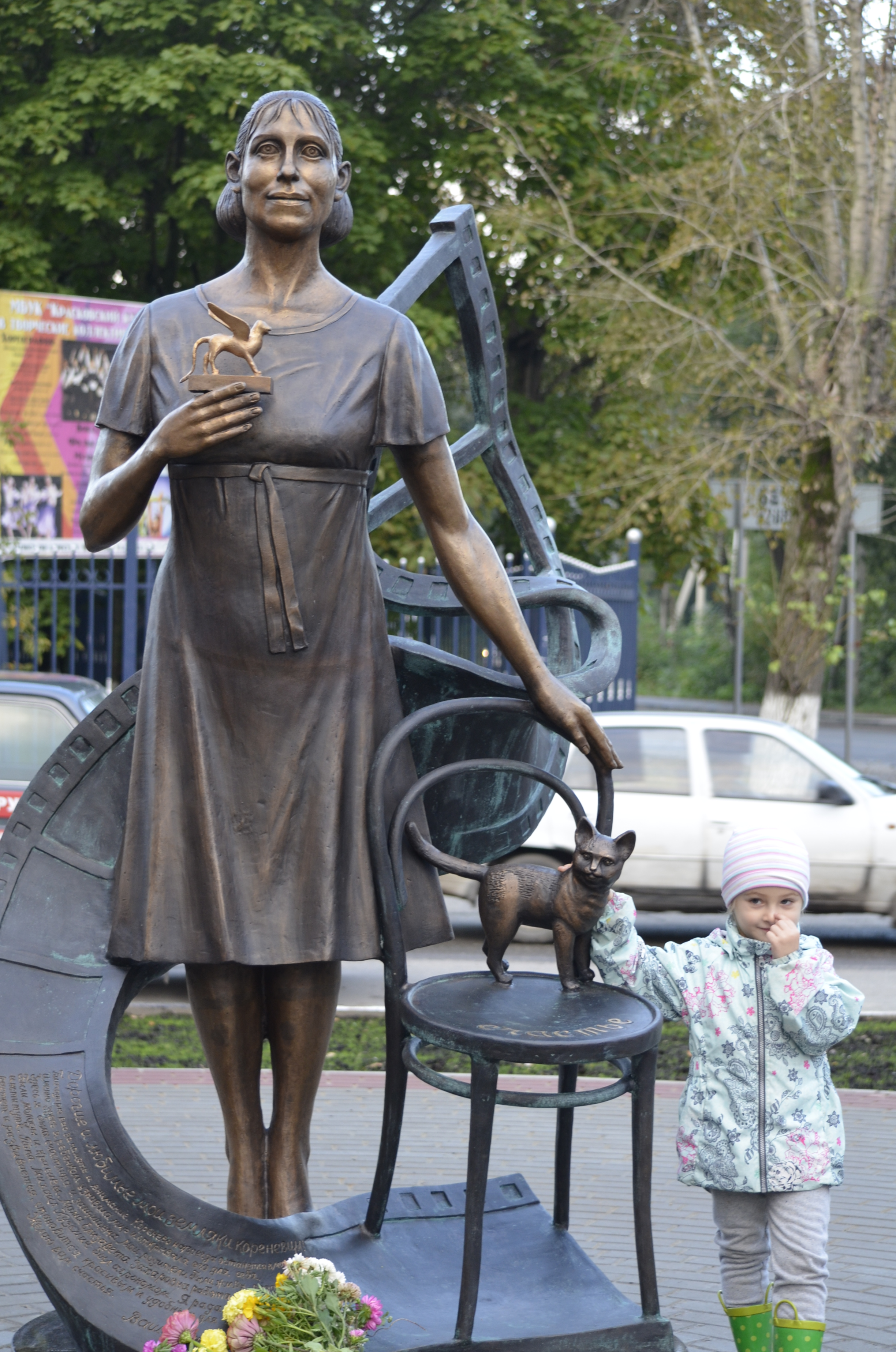 скульптурная композиция к фильму "Начало"